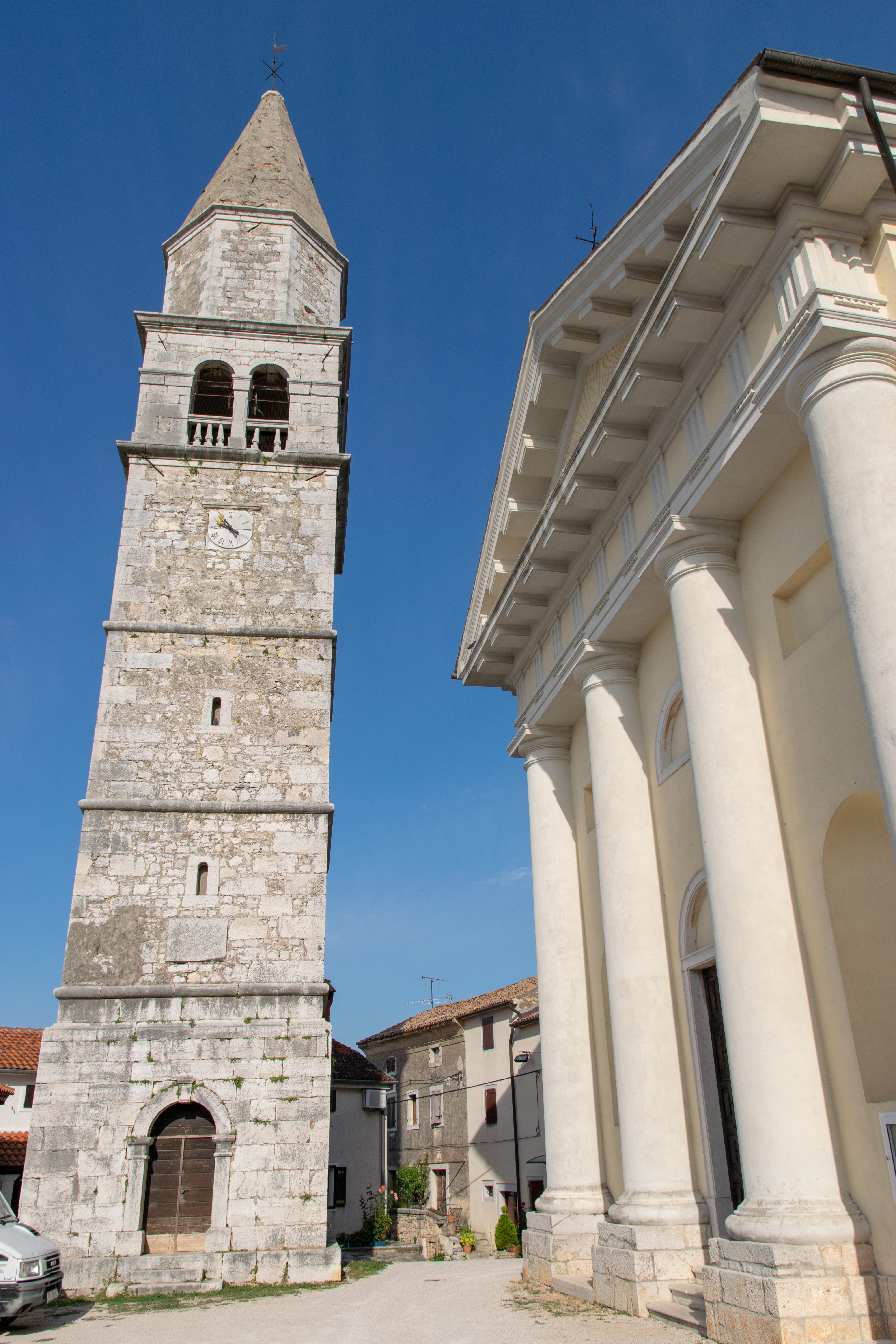 Višnjan